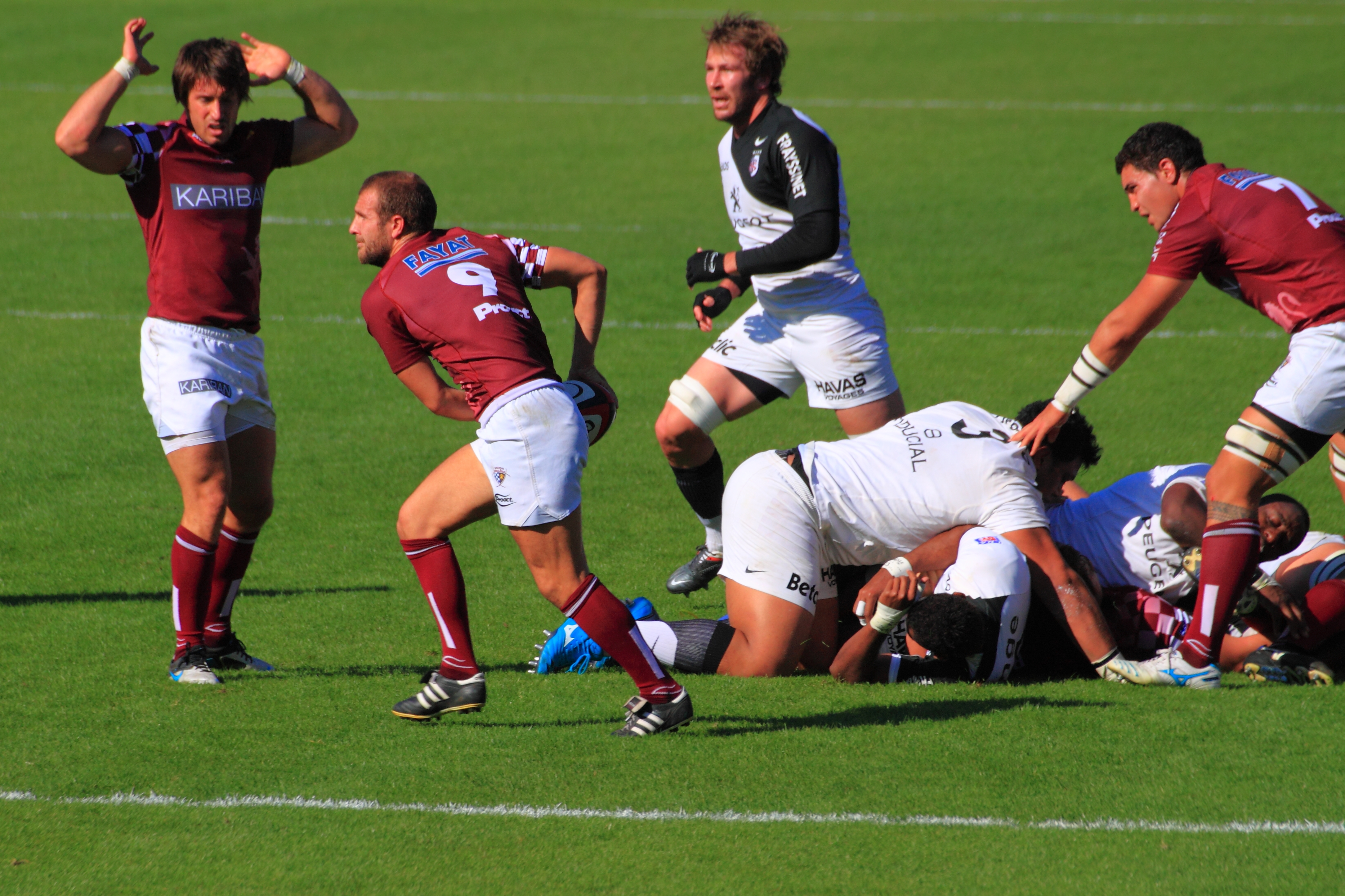 Julien Seron faisant une passe lors de la rencontre de top 14 Stade toulousain vs Union Bordeaux Bègles du 22 octobre 2011